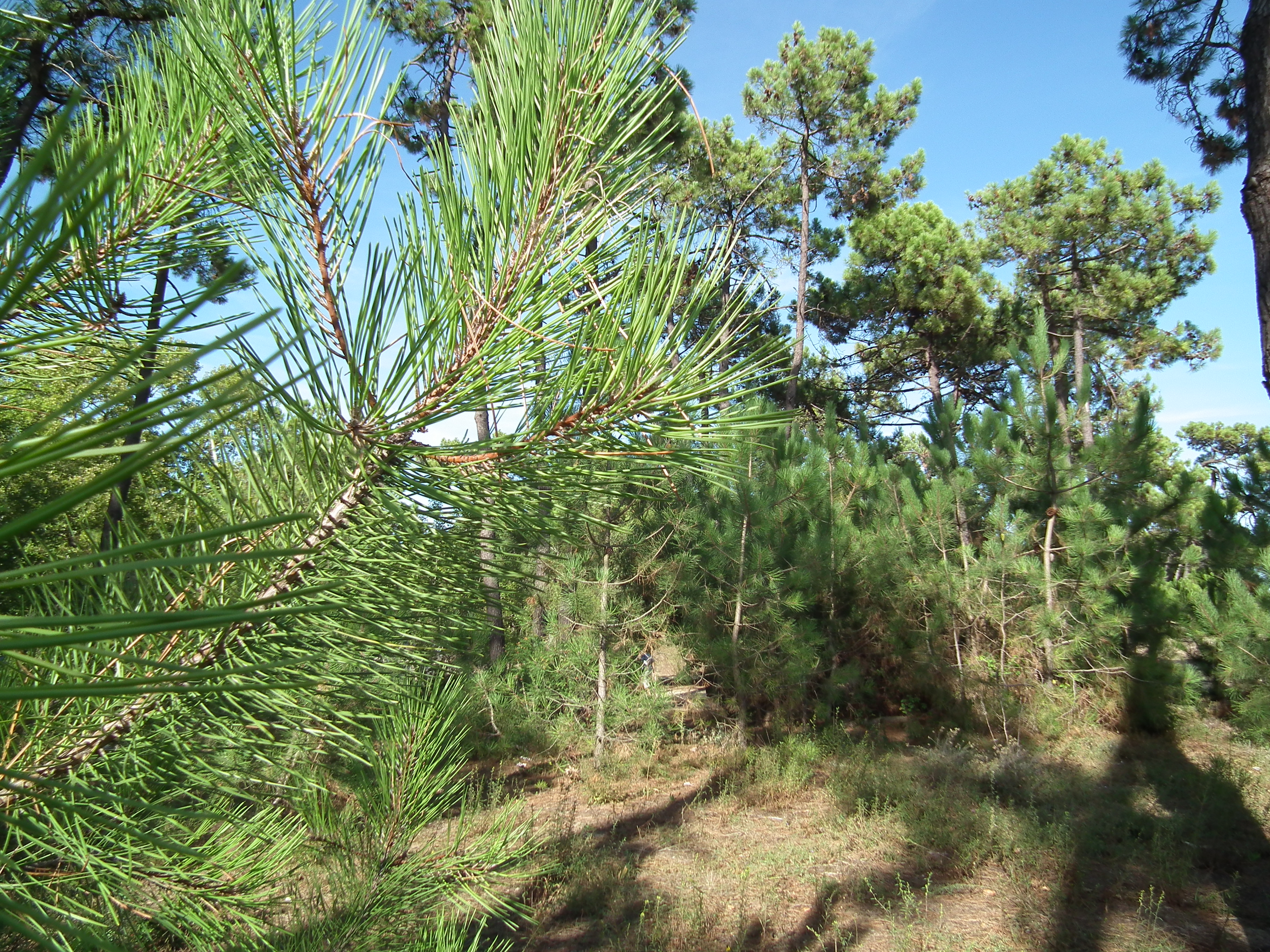 Forêt domaniale de Saint-Trojan